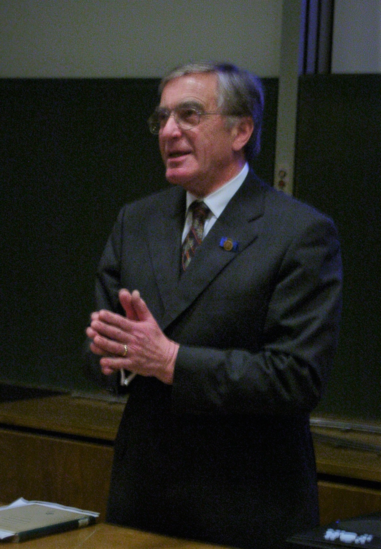 Mesch, Franz in typischer Körperhaltung